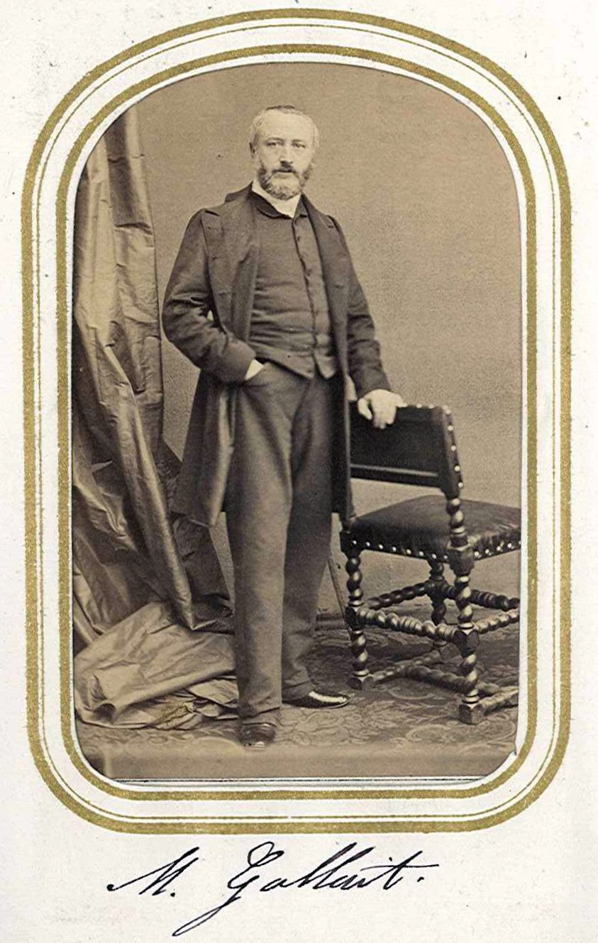 Portrait du peintre Louis Gallait (1810-1887)